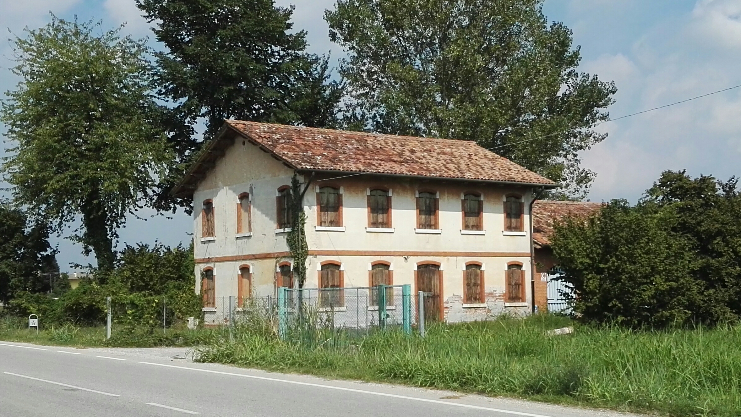 Cristiano28081968, Foto scattata da fotocamera personale, "Sorgenti Vecchie" area a sud ex abitazione del custode, sono l'autore dell'opera e la pubblico nel pubblico dominio.